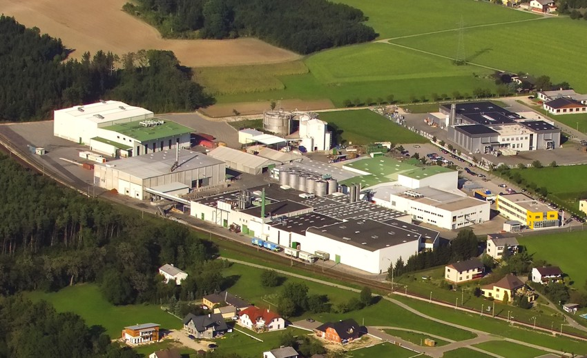 YbbstalerFlugaufnahme